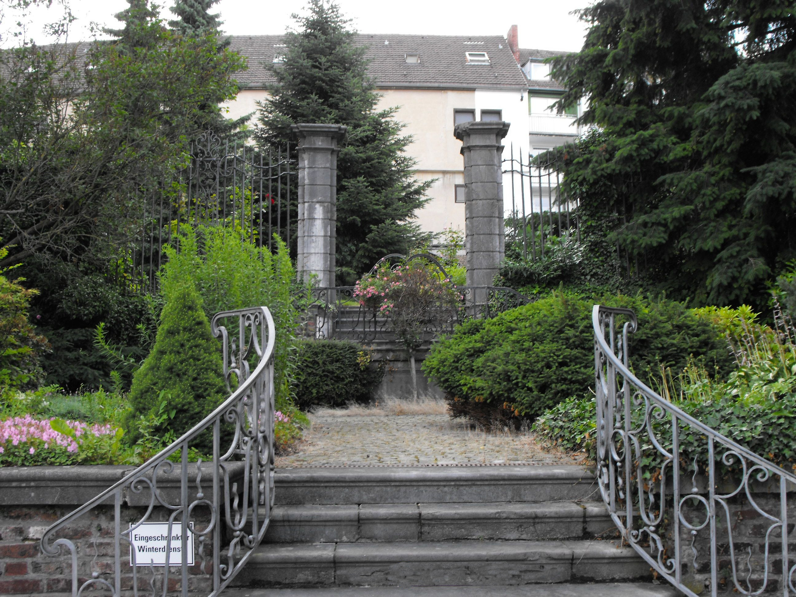 Treppenanlage im Garten des ehemaligen Haus Fey, Seilgraben 32